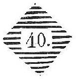 Stempeldetail nach Stempelformen am Beispiel historischer Braunschweiger Poststempel, hier: Rostrautenstempel